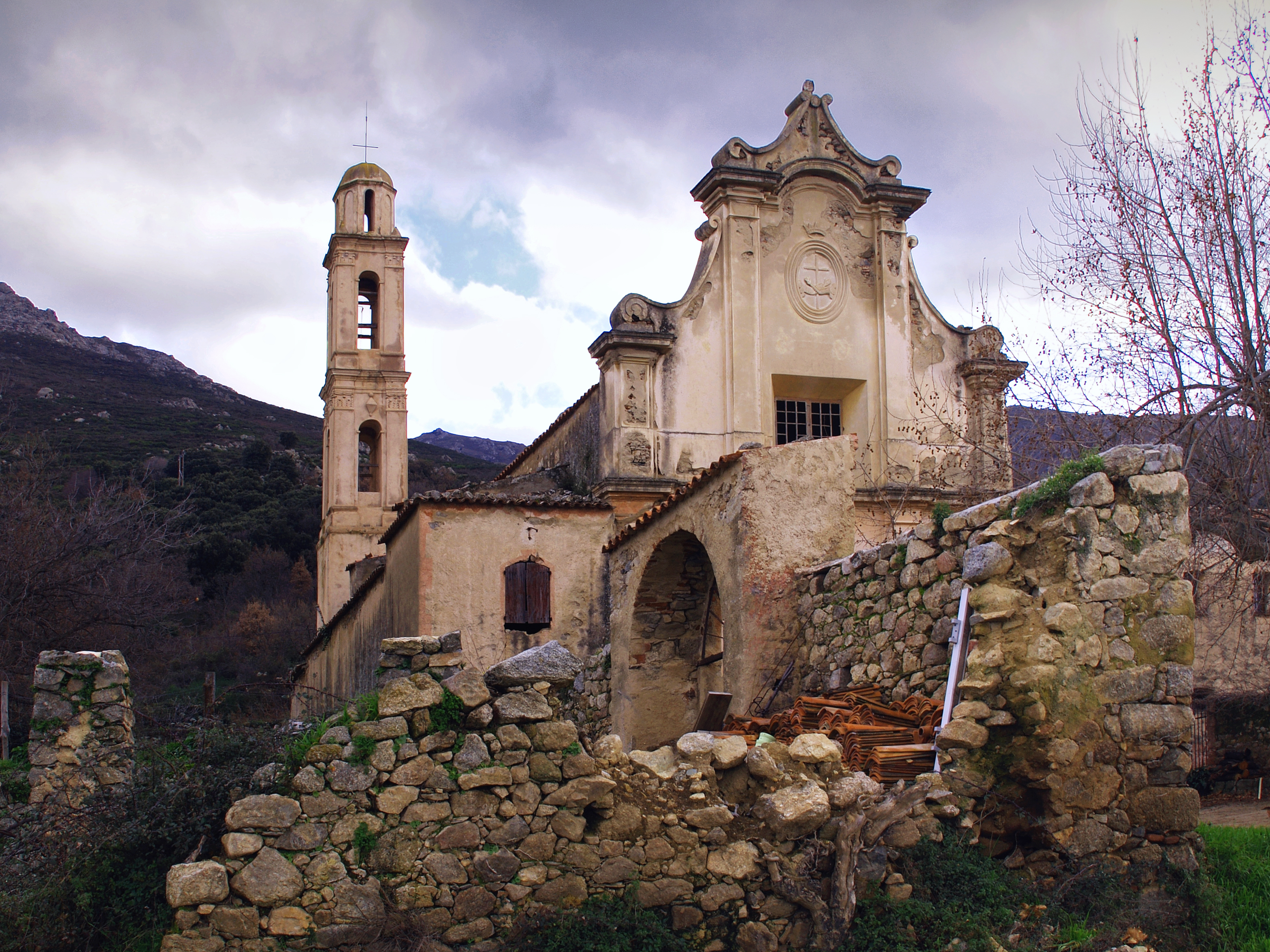 Costa, Balagne (Corse) - Ancien couvent de Tuani (MH)